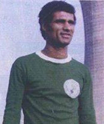 محمد عماشة لاعب غزل المحلة